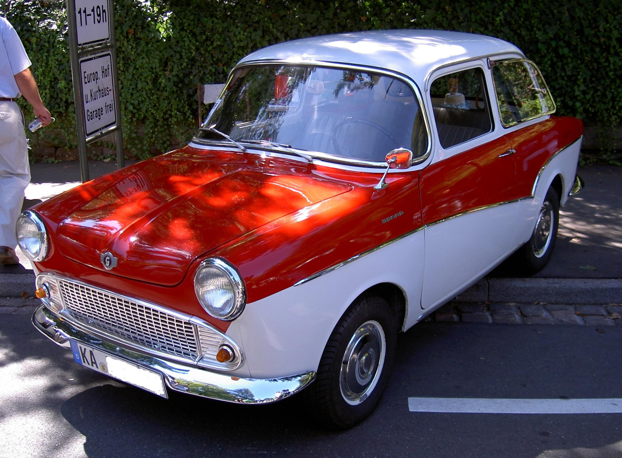 Glas Isard Bj. 1964 (Isard, weil der Wagen ursprünglich nach Belgien exportiert wurde)